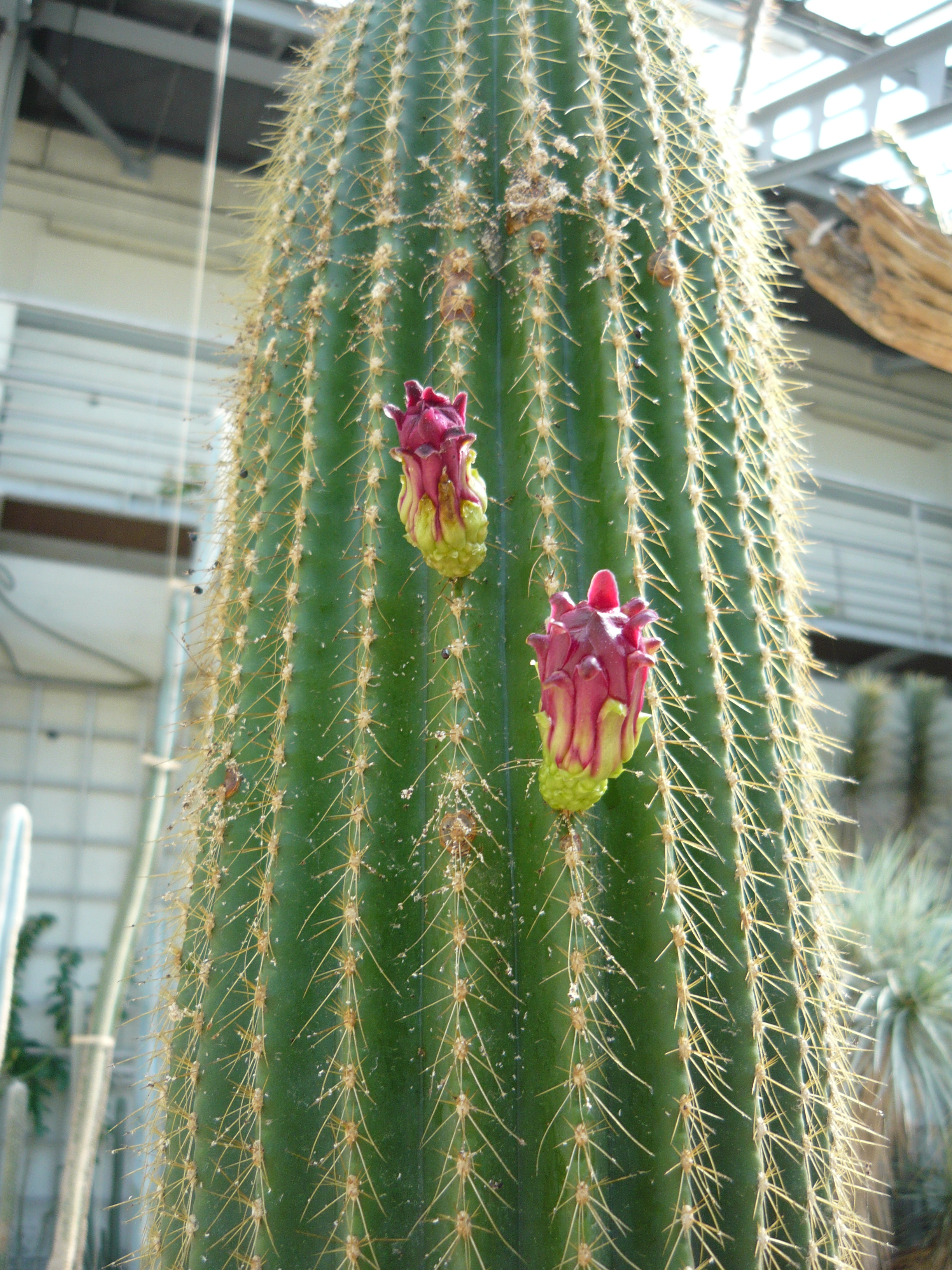 Carnegiea Neobuxbaumia polylopha. Real Jardín Botánico de Madrid.